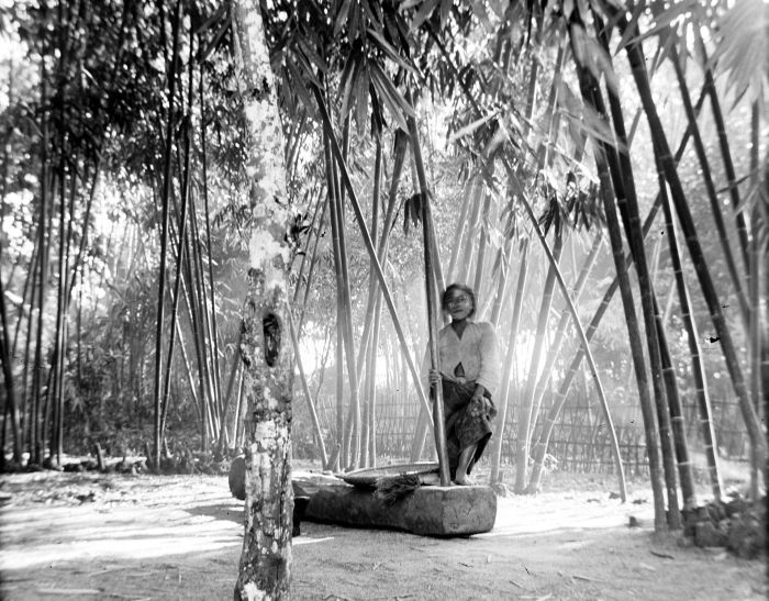 Negatief. Rijst stampen in de dessa, Bandoeng